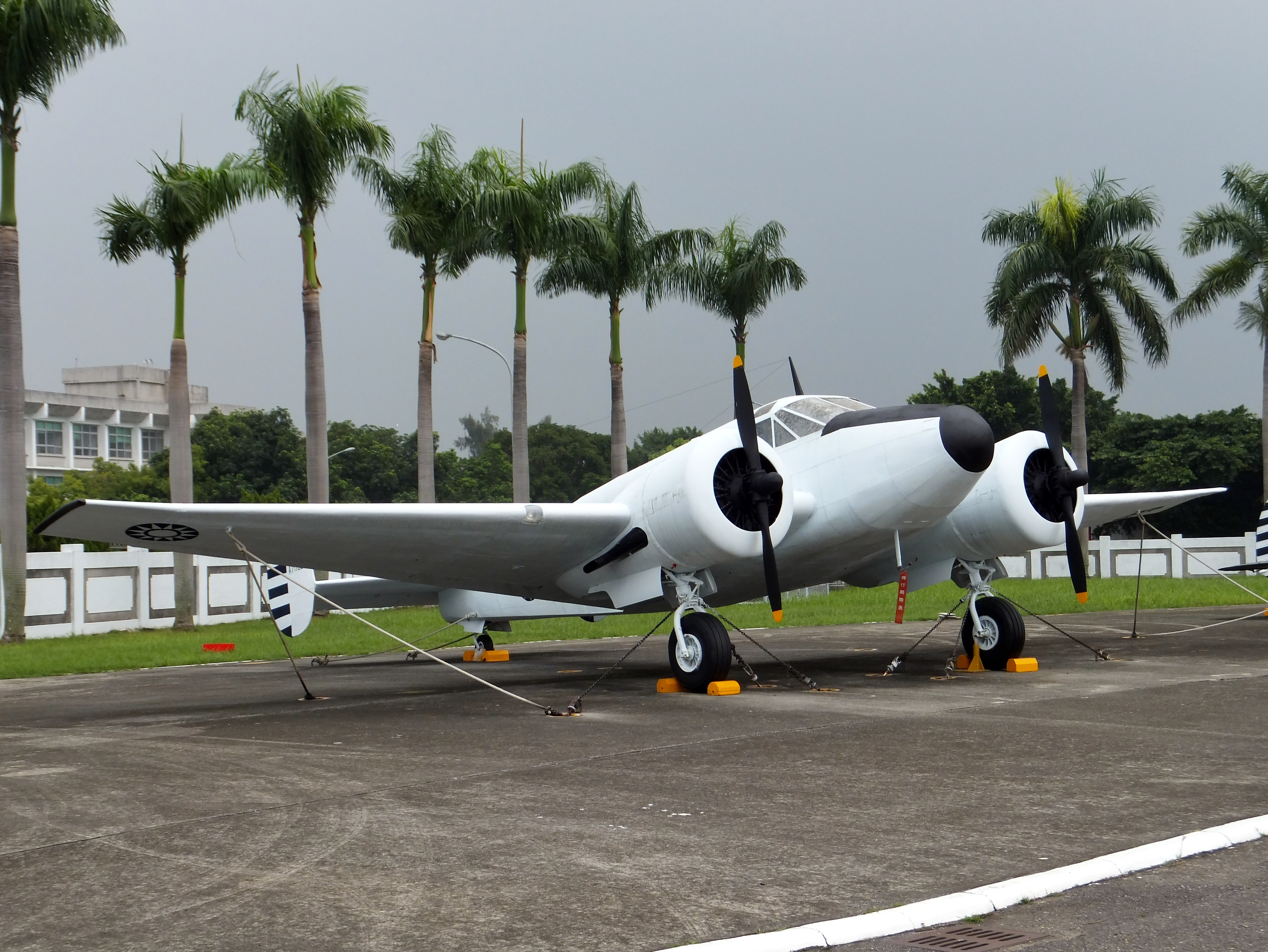 岡山空軍官校軍機展示場的畢琪AT-11高級教練機，中華民國空軍於1950年取得本機供官校高級飛行訓練，1958年除役後移交遠東航空改裝為運輸機，1996年6月歸還空軍展示。